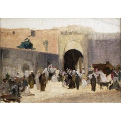 Иосиф-Казимир Константинович Будкевич (1841—1895) — российский живописец И.К.Будкевич. "Иерусалим"